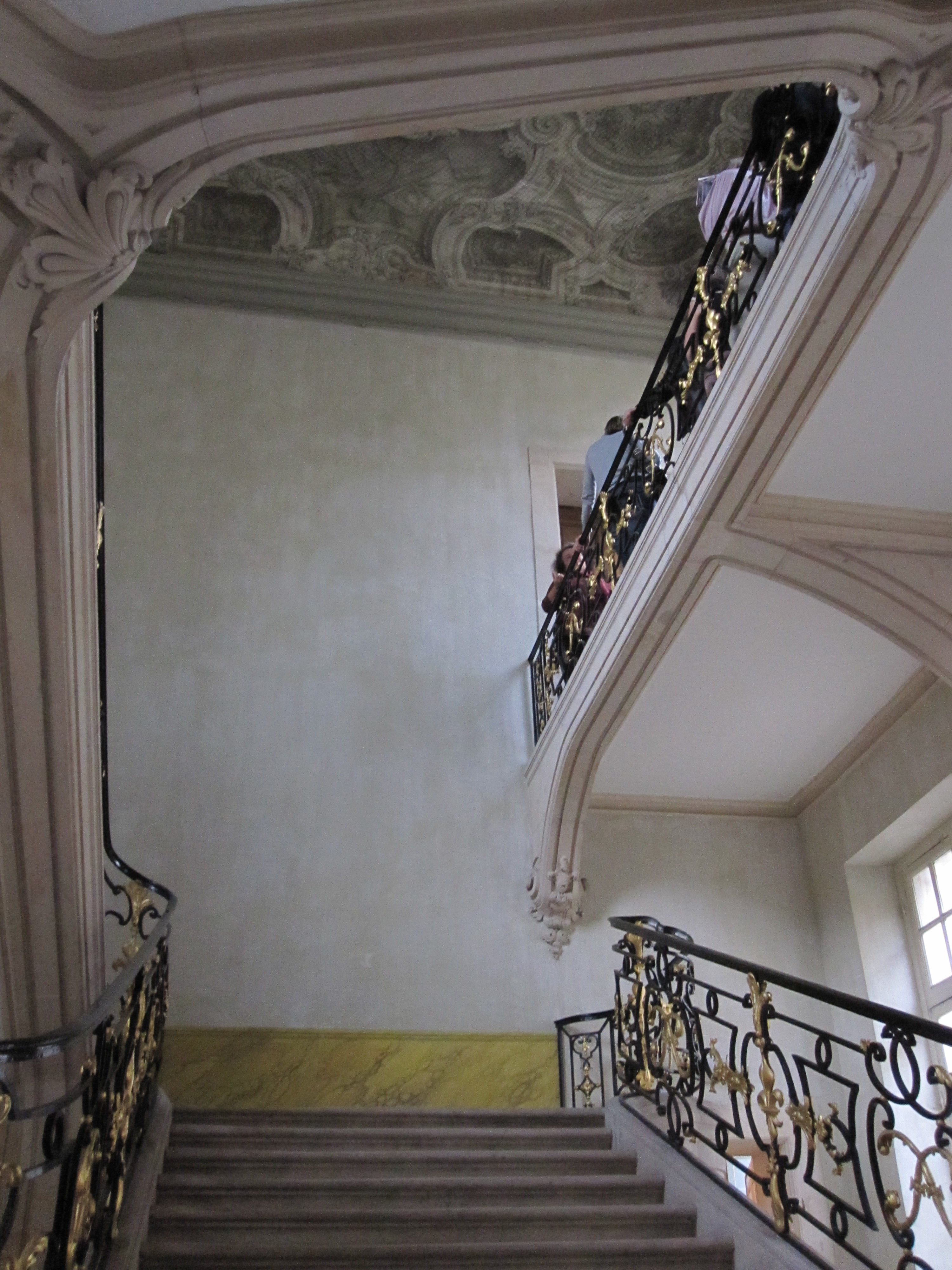 54 Nancy Hôtel de Ferraris - escalier